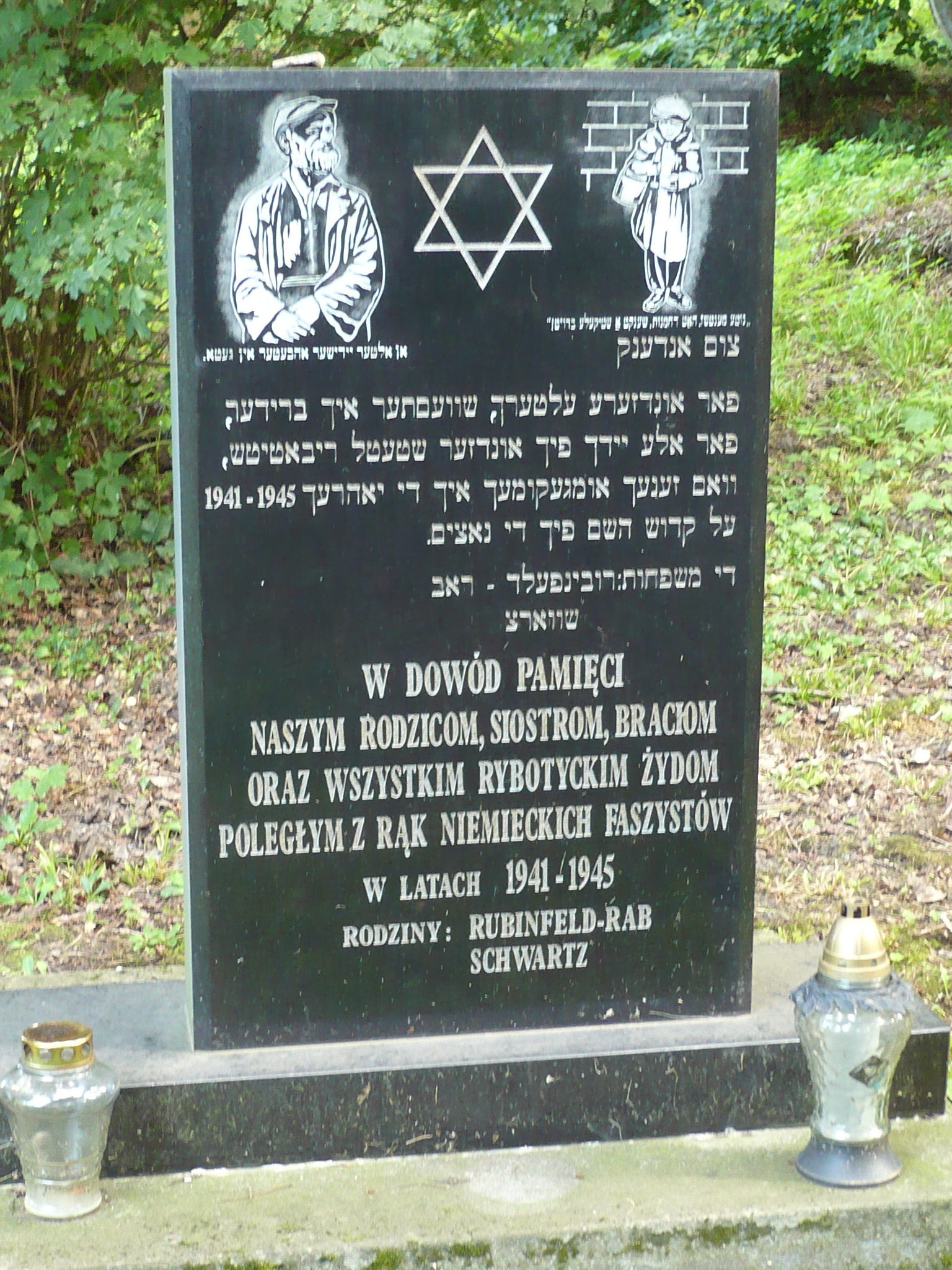 Przemyśl, nowy cmentarz żydowski